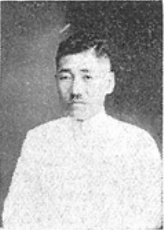 岩満 重